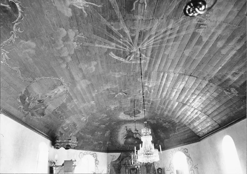 Takvalvet. Efter konservering. Kategori: (03) Målningar på träTakvalvet. Efter konservering.